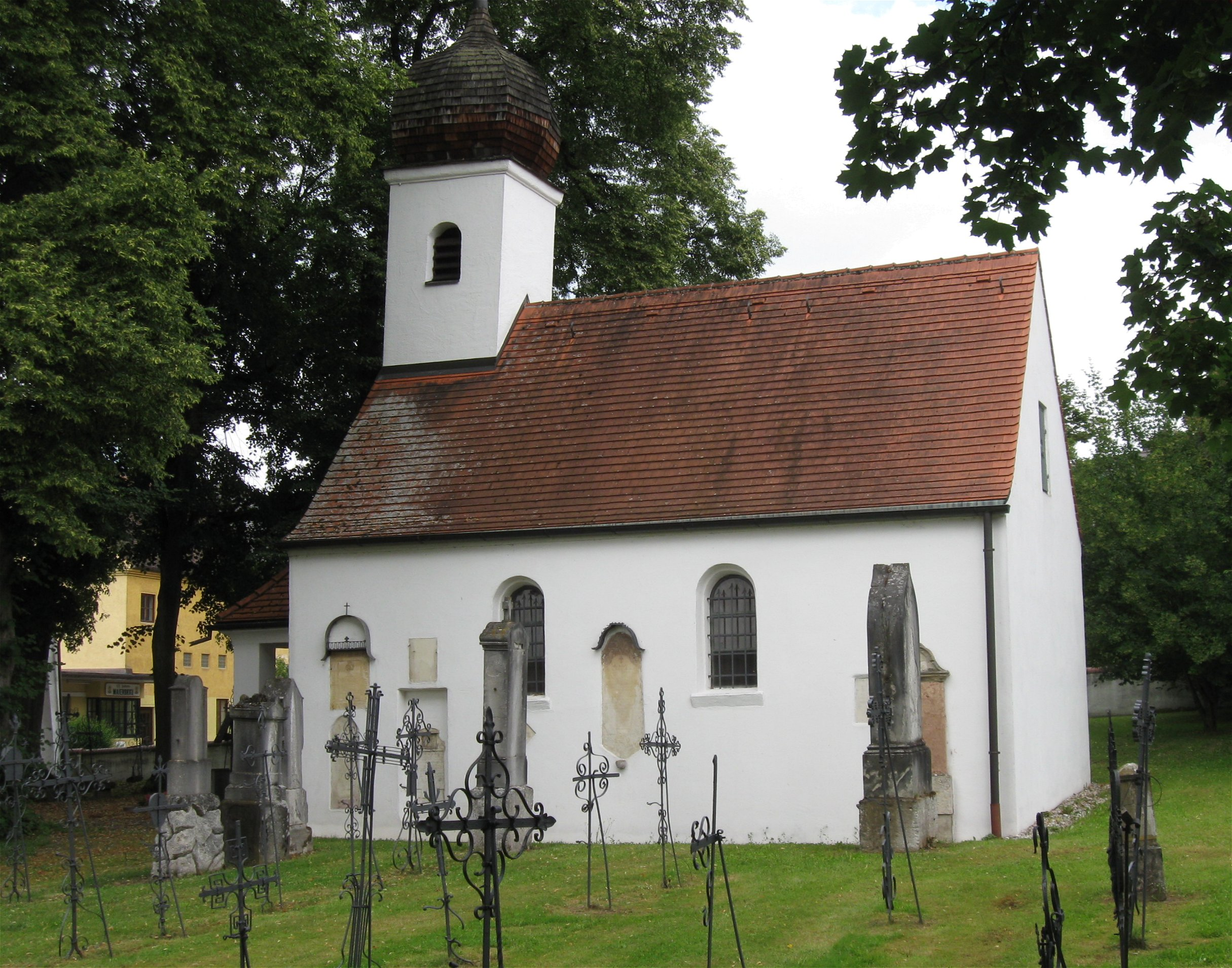 D-1-74-111-15 Jörgerring 8. Loreto-Kapelle, 1737; Umbau zur Kriegergedächtniskapelle 1921; Friedhofsanlage mit 82 schmiedeeisernen Grabkreuzen (17.-19. Jh.) und 12 steinernen Grabdenkmälern des 19. Jhs.